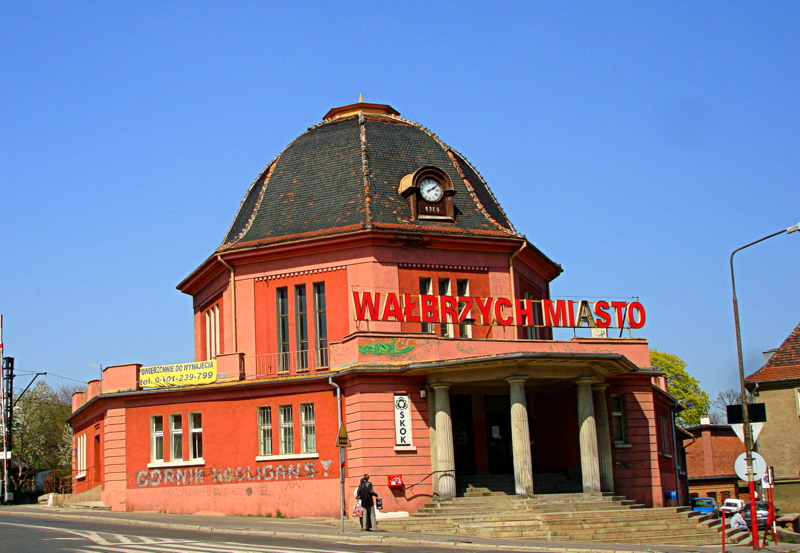 dworzec PKP Wałbrzych - Miasto, XIX/XX Wałbrzych